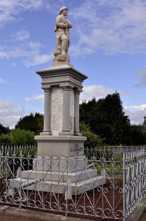 Monument aux morts de Céaux d'Allegre